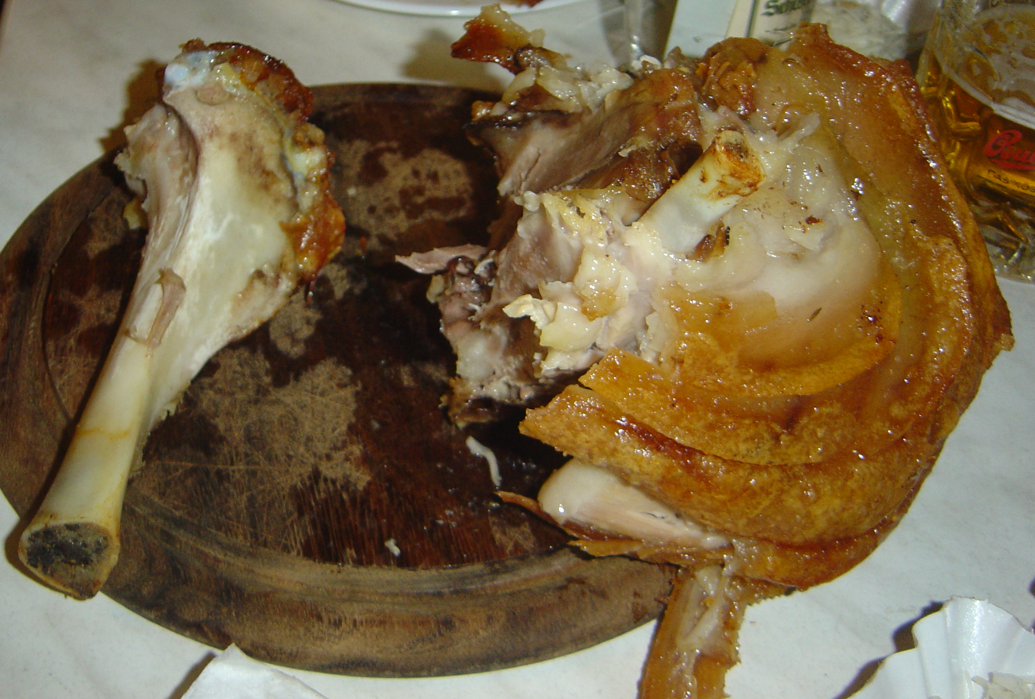 roast knuckle from Schweizerhaus, Vienna